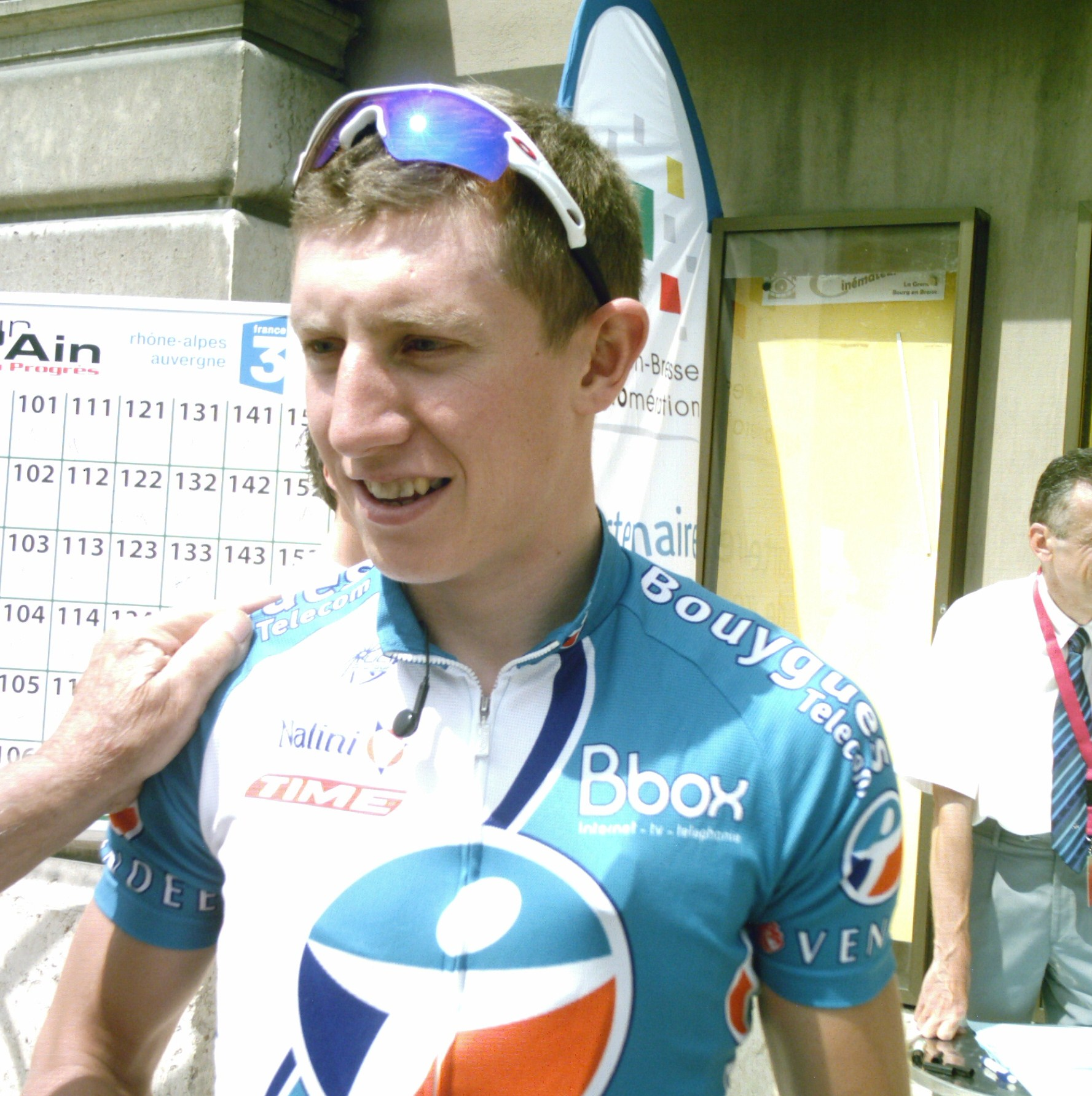 Cyril Gautier lors de la signature préalable au départ de la première étape du Tour de l'Ain 2009